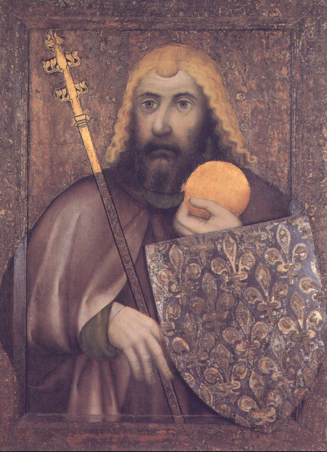 Saint Louis